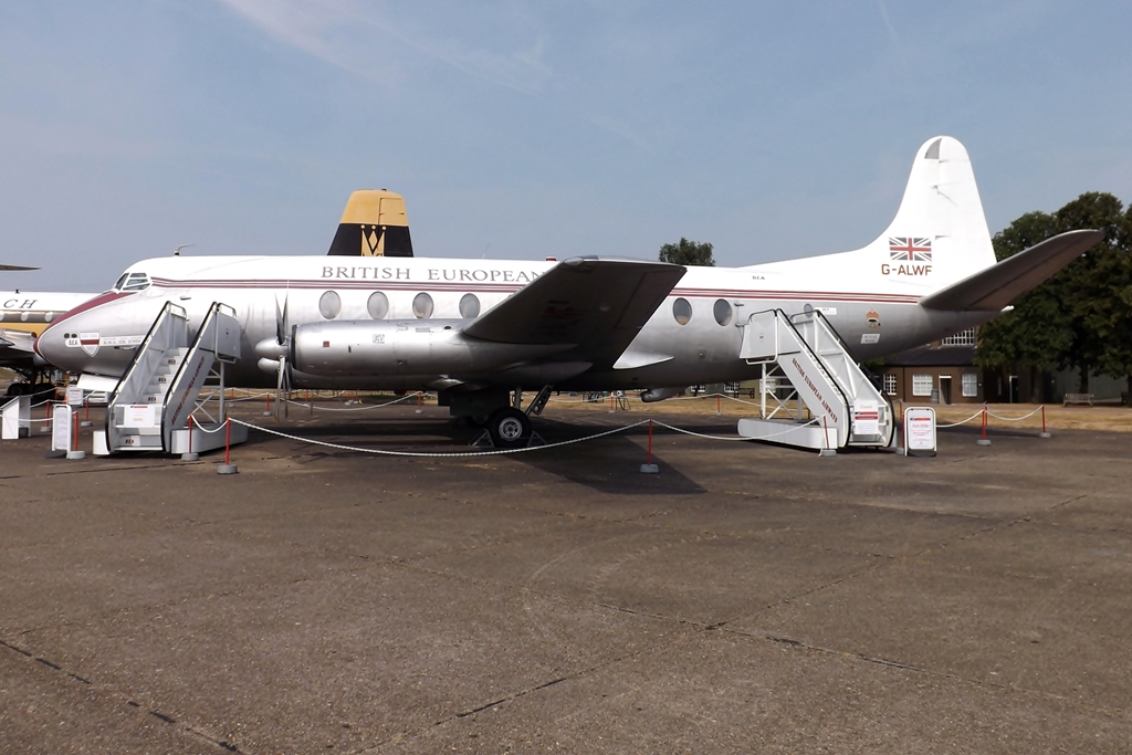 G-ALWF Vickers Viscount